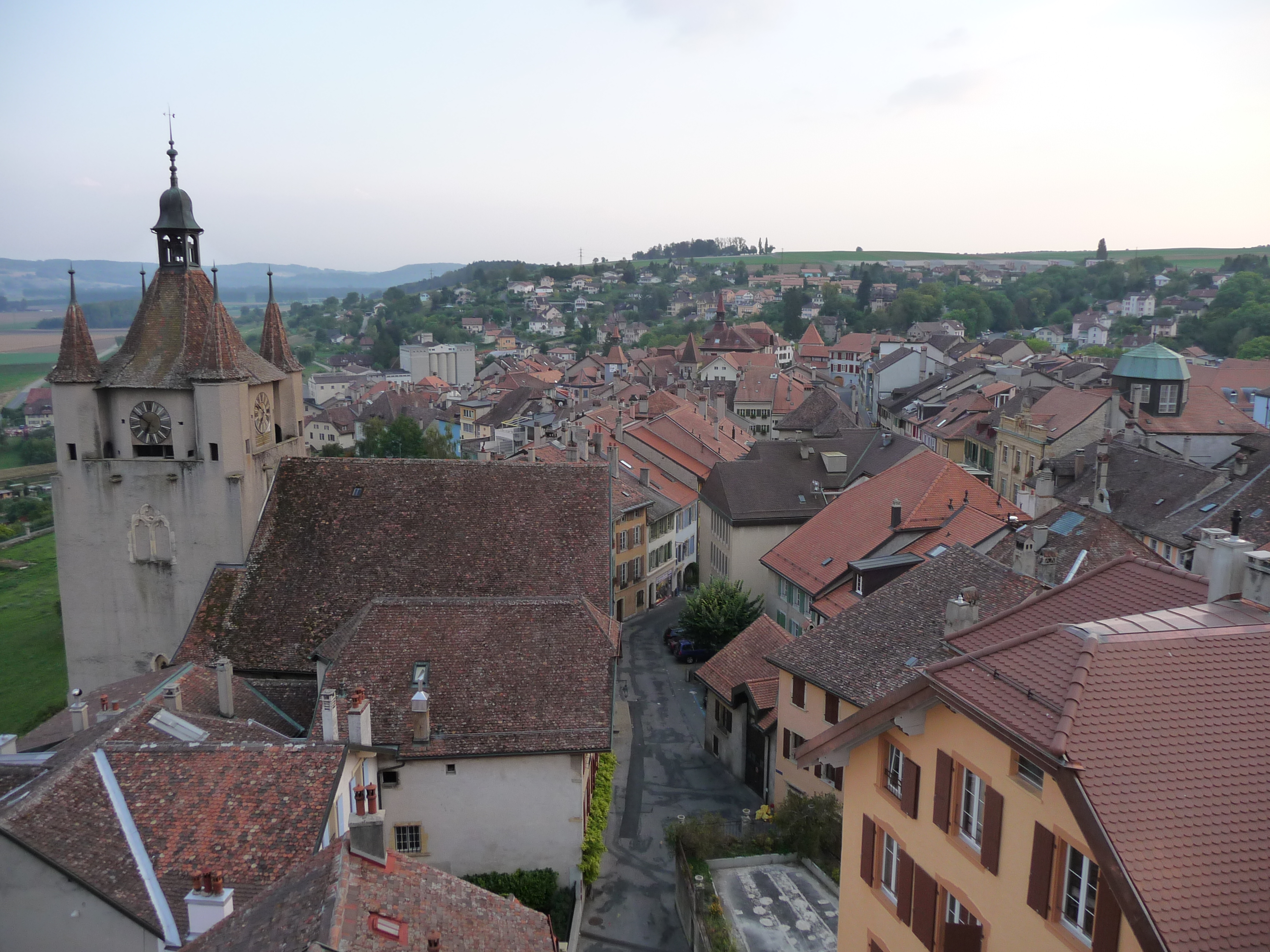 Orbe.